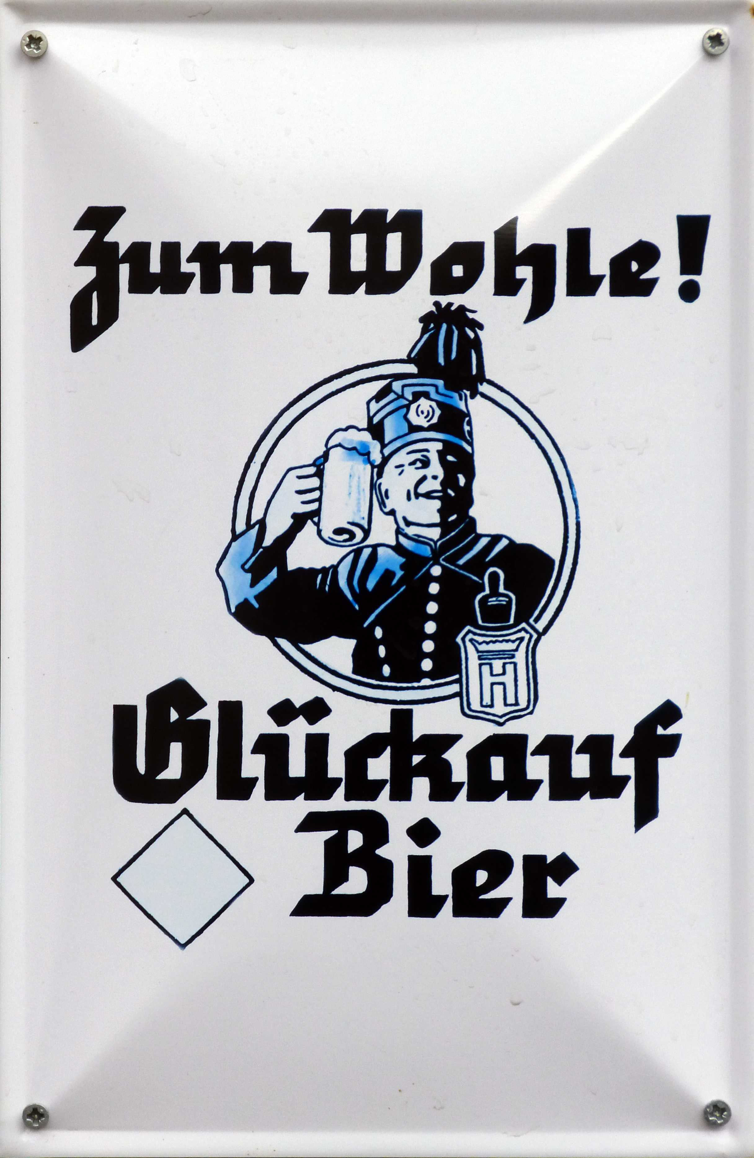 Email-Schild Zum Wohle!; Glückauf Bier um 1930.